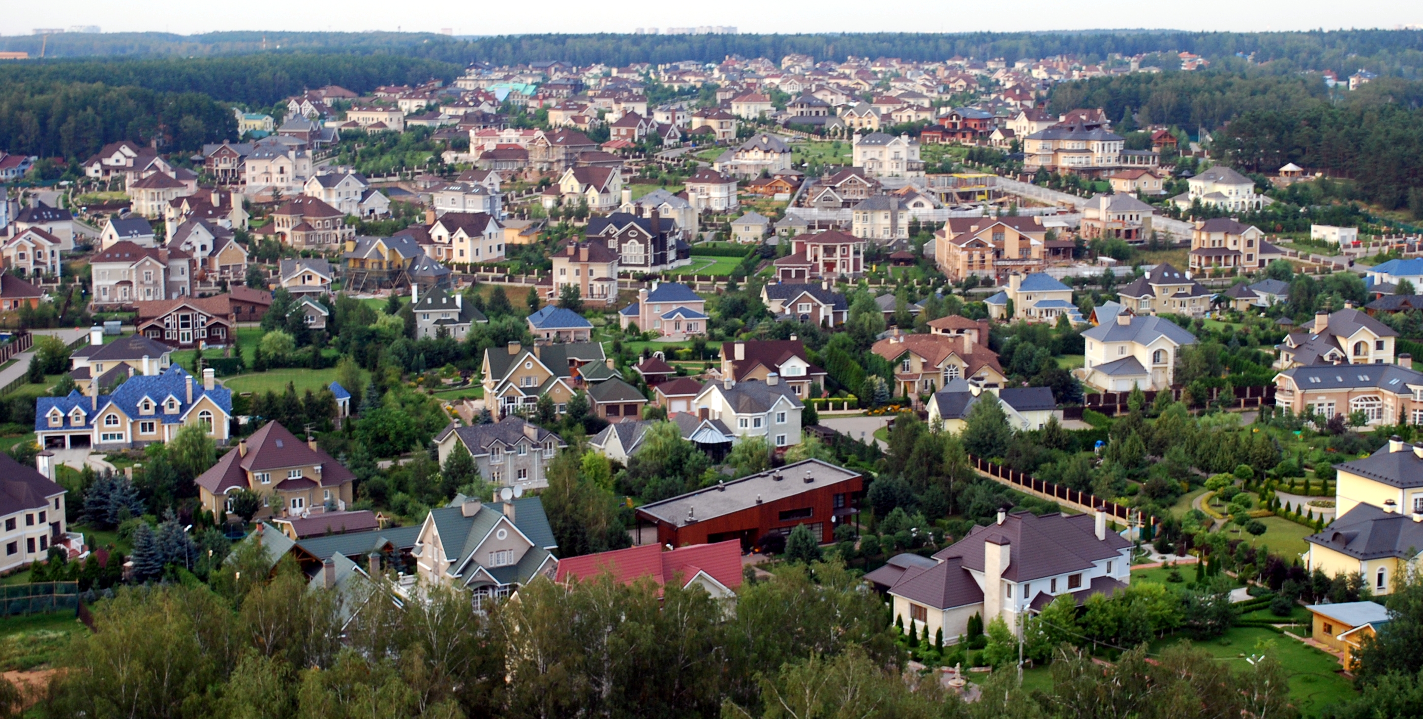 Веледниово- вид с высоты птичьего полета